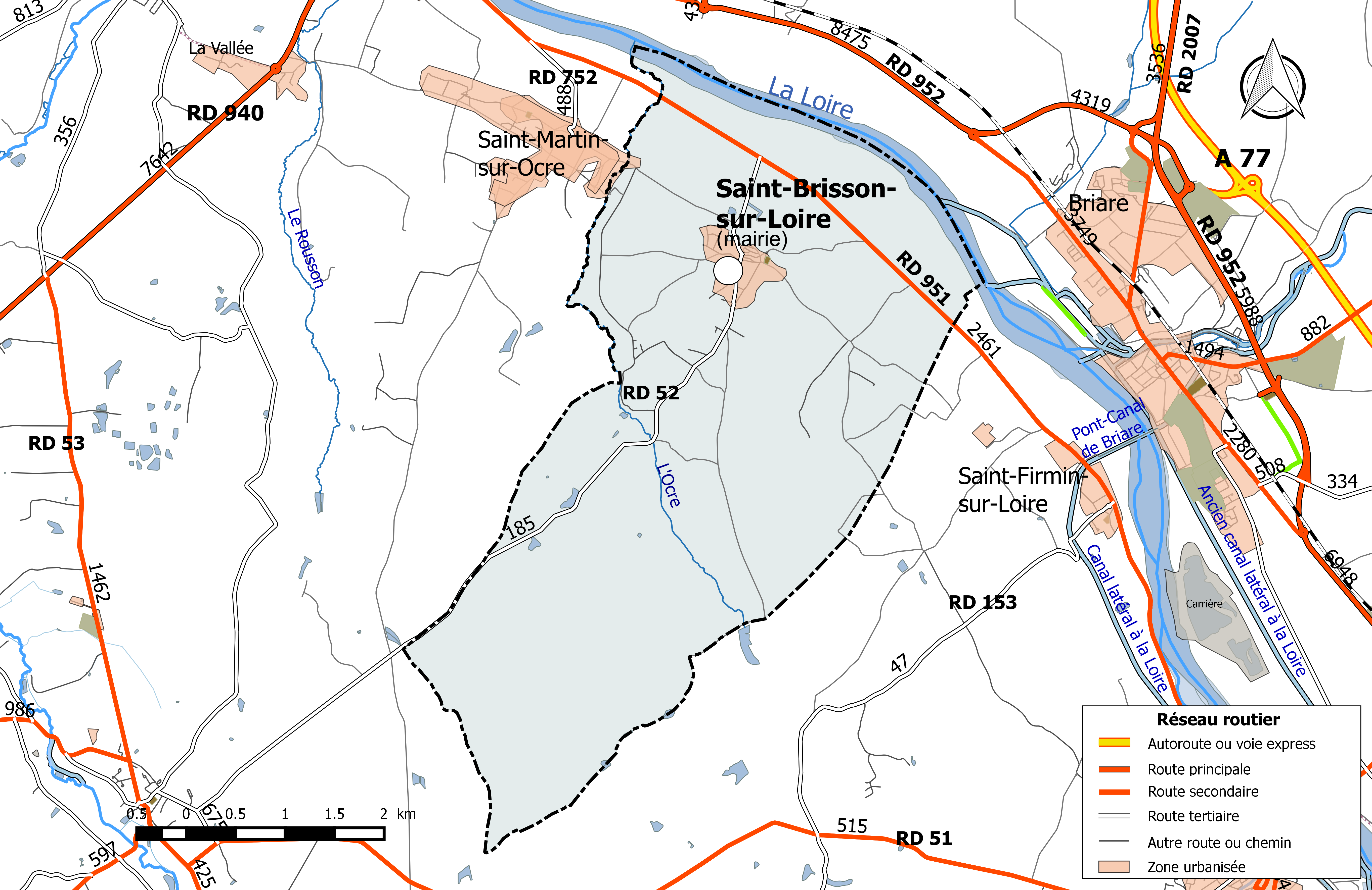 Carte du réseau routier de la commune de Saint-Brisson-sur-Loire.